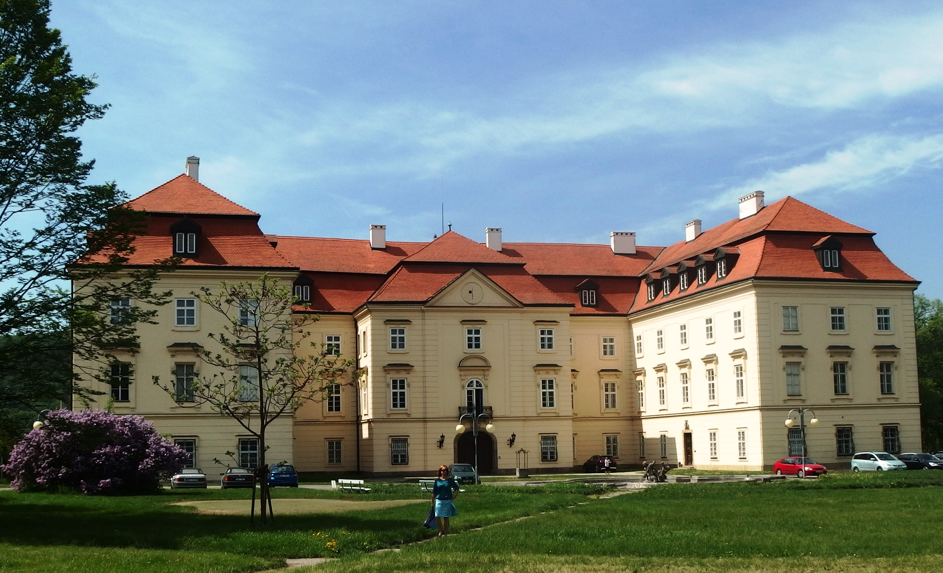 Zámek Napajedla, Napajedla 265, Napajedla.